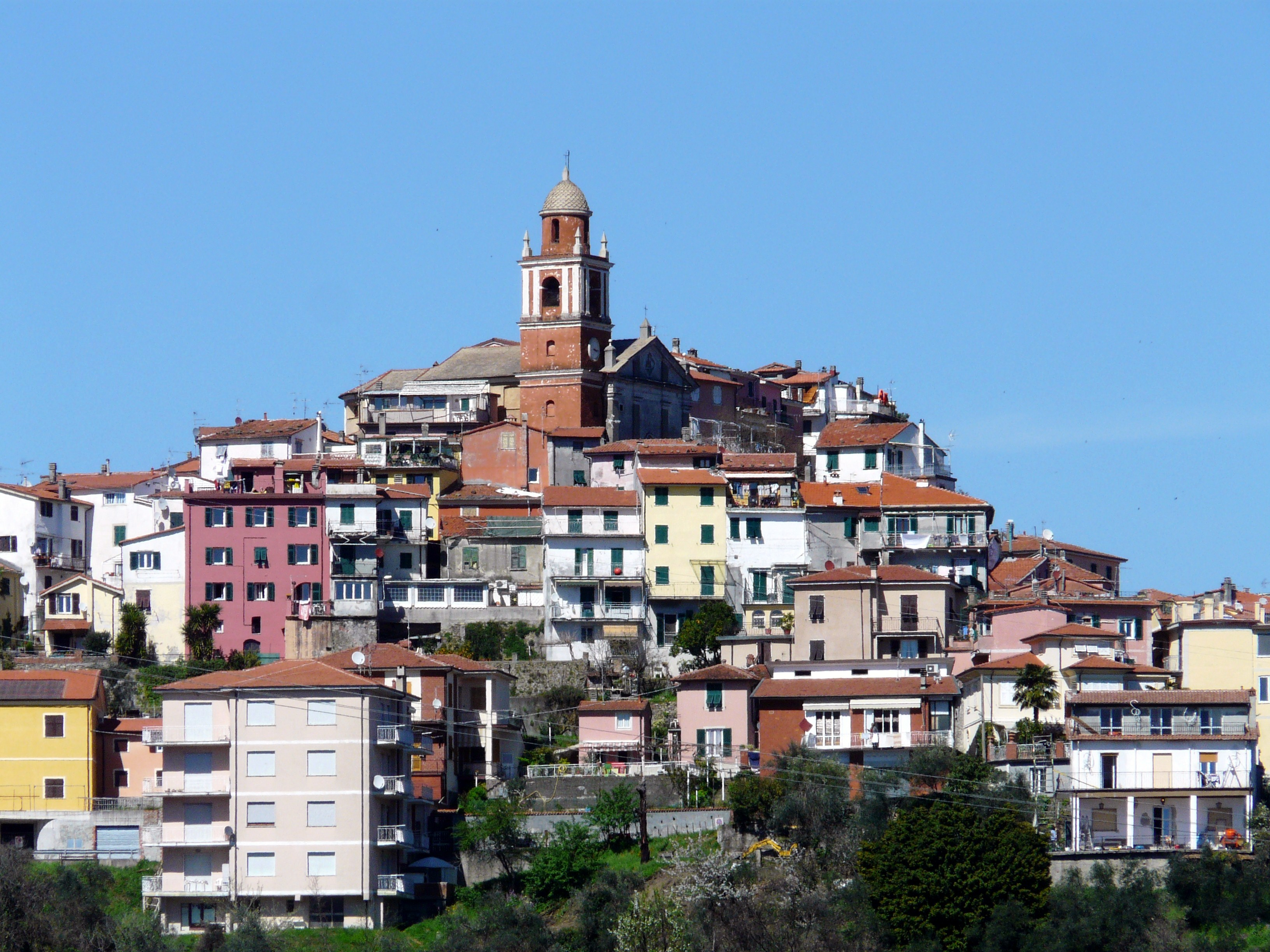 Panorama di Valeriano, Vezzano Ligure, Liguria, Italia